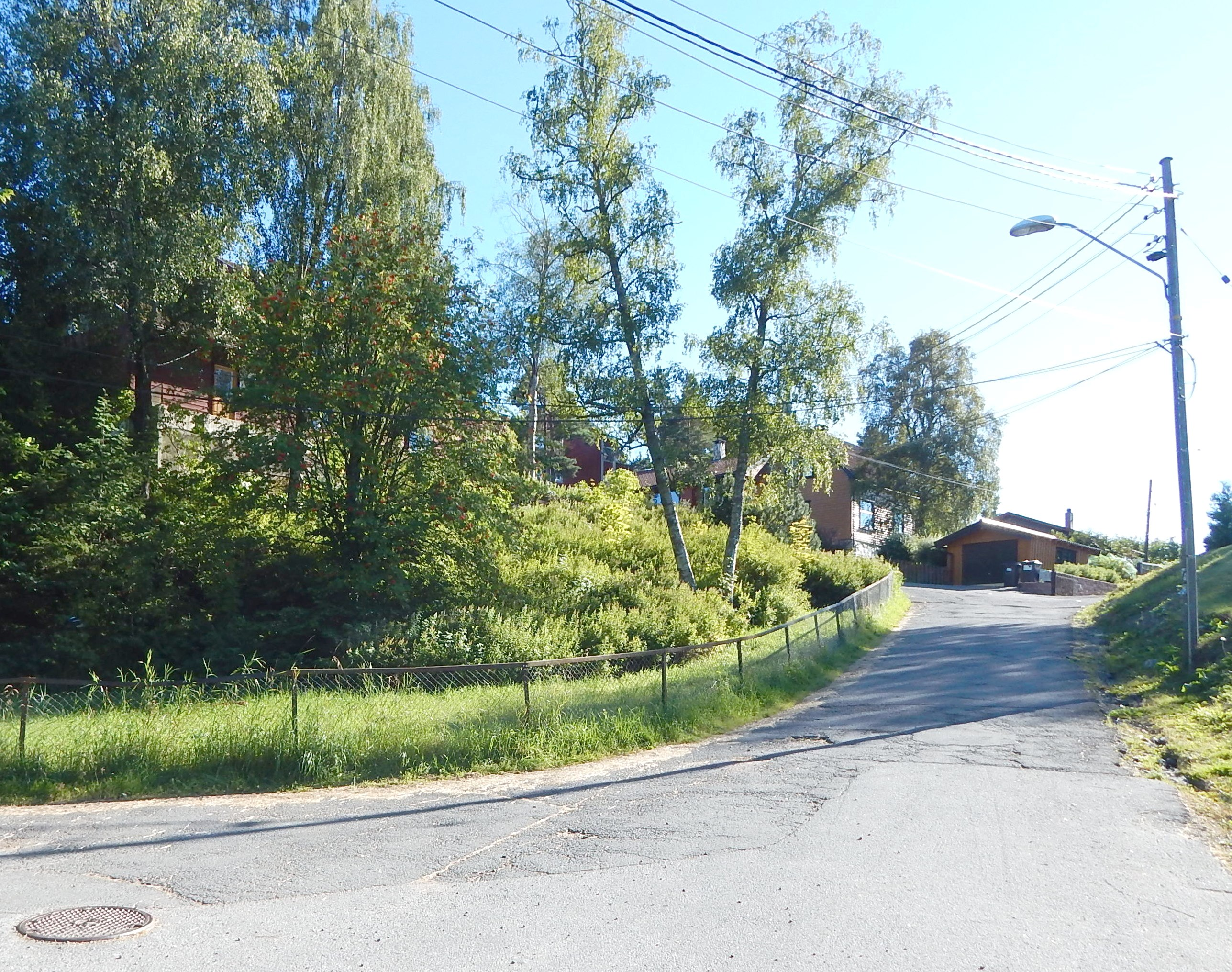 Landeroveien